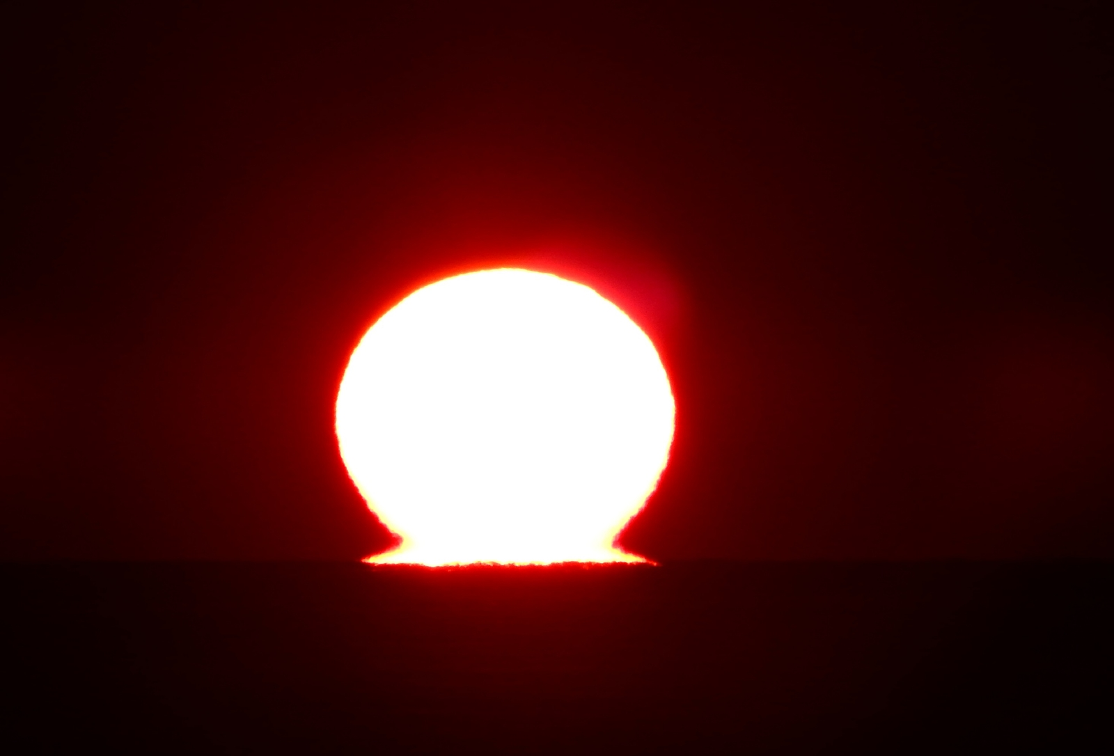 室戸岬の日の入り